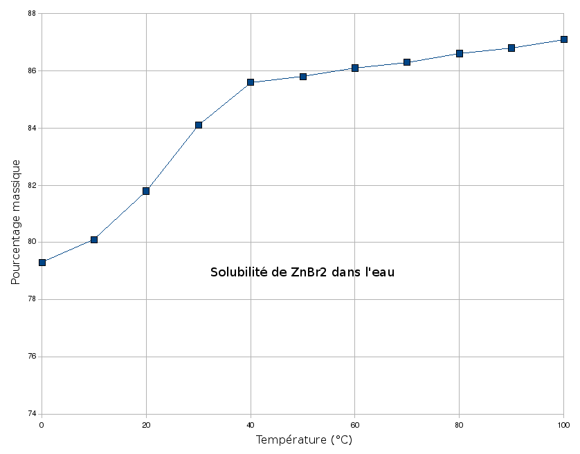 Solubilité du bromure de zinc dans l'eau en fonction de la température.